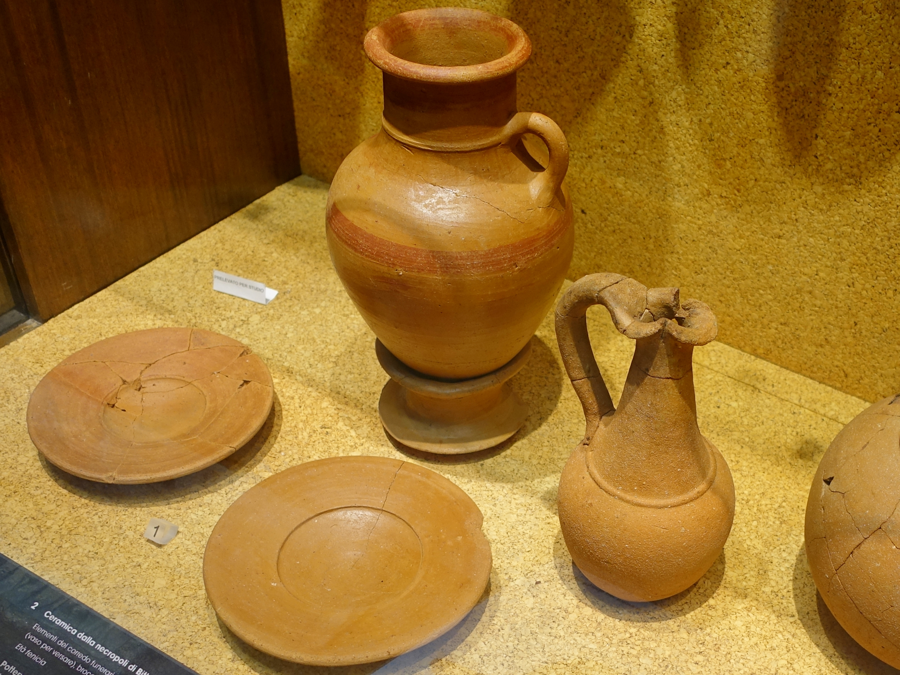 Fundstücke aus der phönizischen Nekropole von Bithia, Gemeinde Domus de Maria, Archäologisches Nationalmuseum Cagliari, Sardinien, Italien